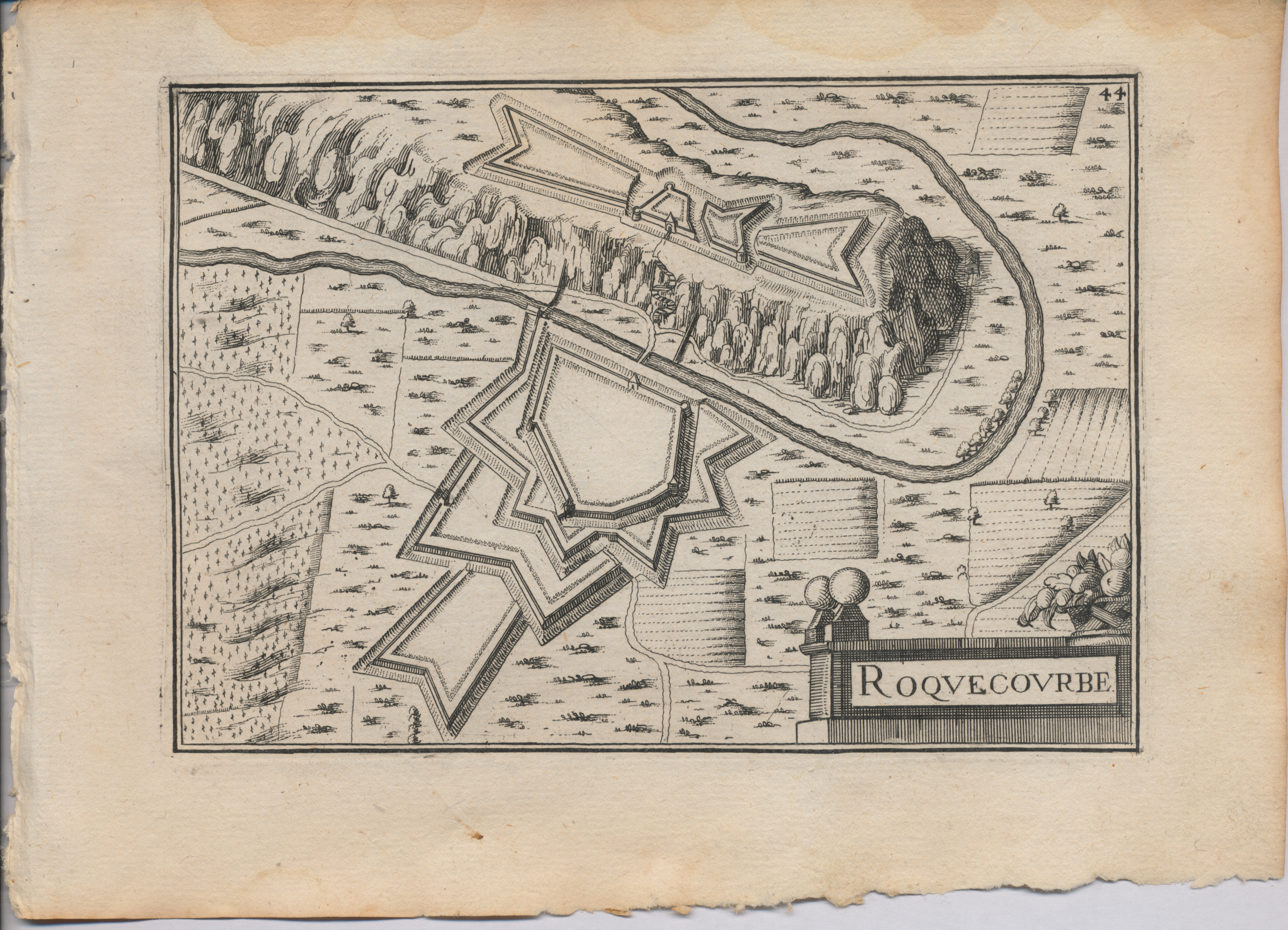 Gravure extraite de "Les Plans et Profils de toutes les principales villes et lieux considérables de France. par le Sieur TASSIN, géographe ordinaire de sa Majesté. A paris, Chez Melchior Tavernier, en l'Isle du Palais. 1634" (Province de Languedoc). Dimensionss : feuille : 19 x 14,5 cm, Gravure : 15 x 10,5 cm.